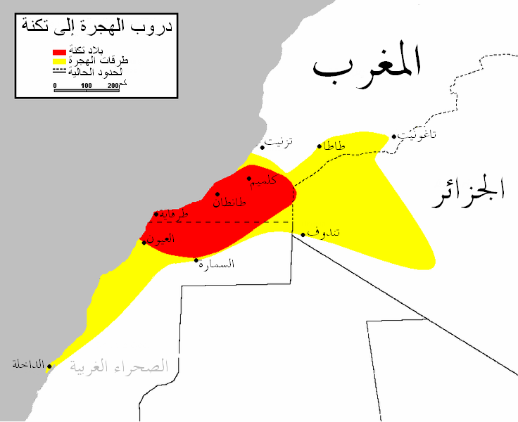 Aire approximative de nomadisation des Tekna Sources: Attilo Gaudio, "Les populations du Sahara occidental: histoire, vie et culture", ed. Karthala 1993, (Chap. VIII, pp.97-116) (ISBN: 2-86537-411-4) [1]Maurice Barbier, "Le conflit du Sahara occidental", ed. L'Harmattan 2000 (ISBN: 285802197X) [2]